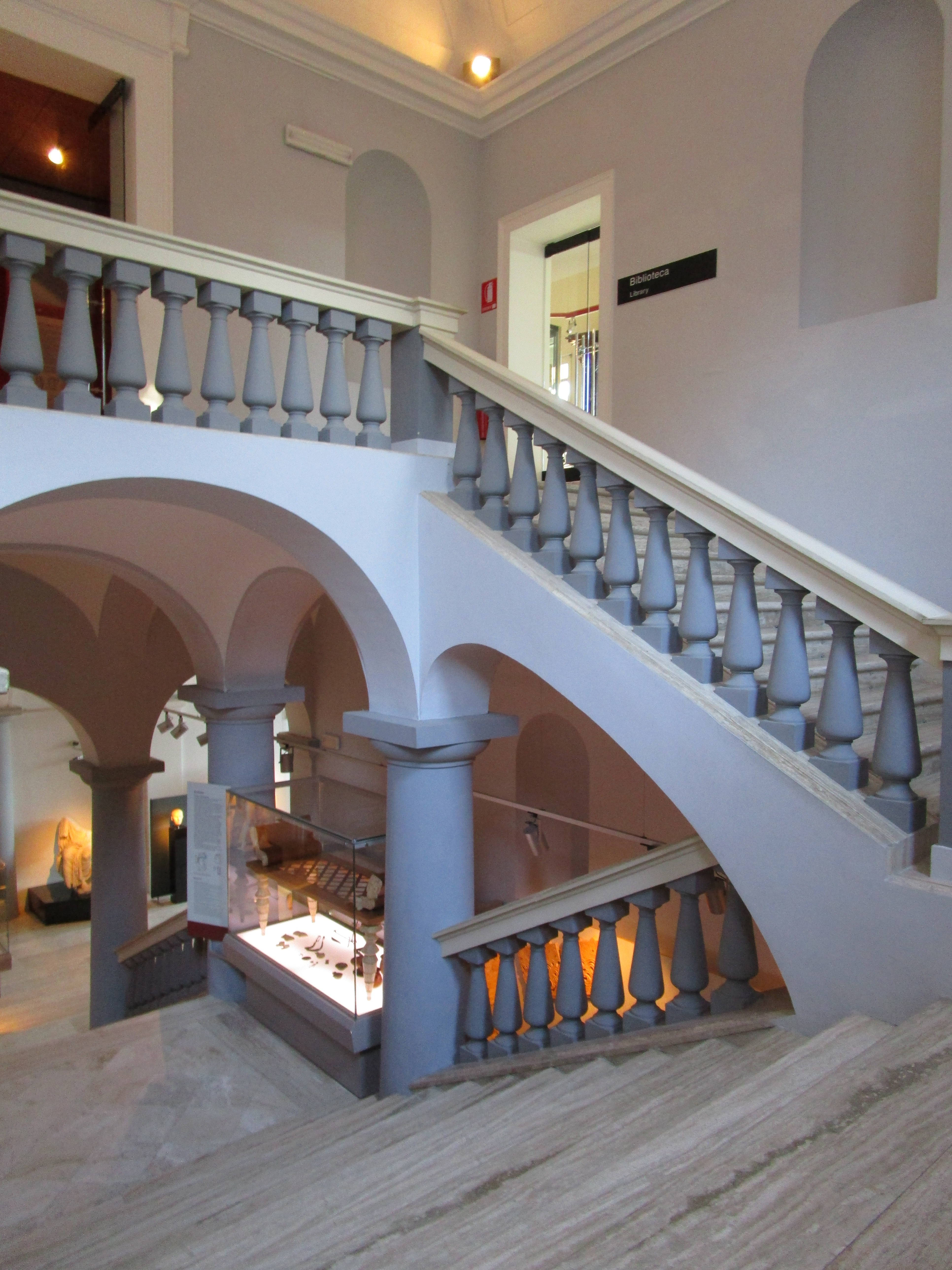 La scalinata del Museo archeologico nazionale d'Abruzzo, ubicato a Chieti, nella vecchia residenza del barone Frigerj